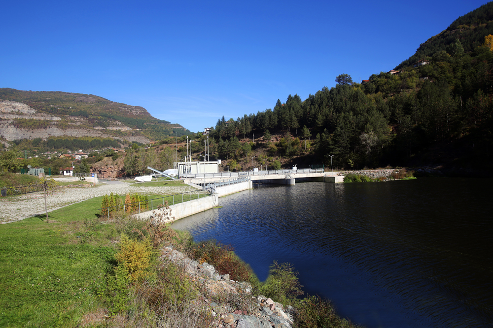 МВЕЦ Церово, гр. Своге